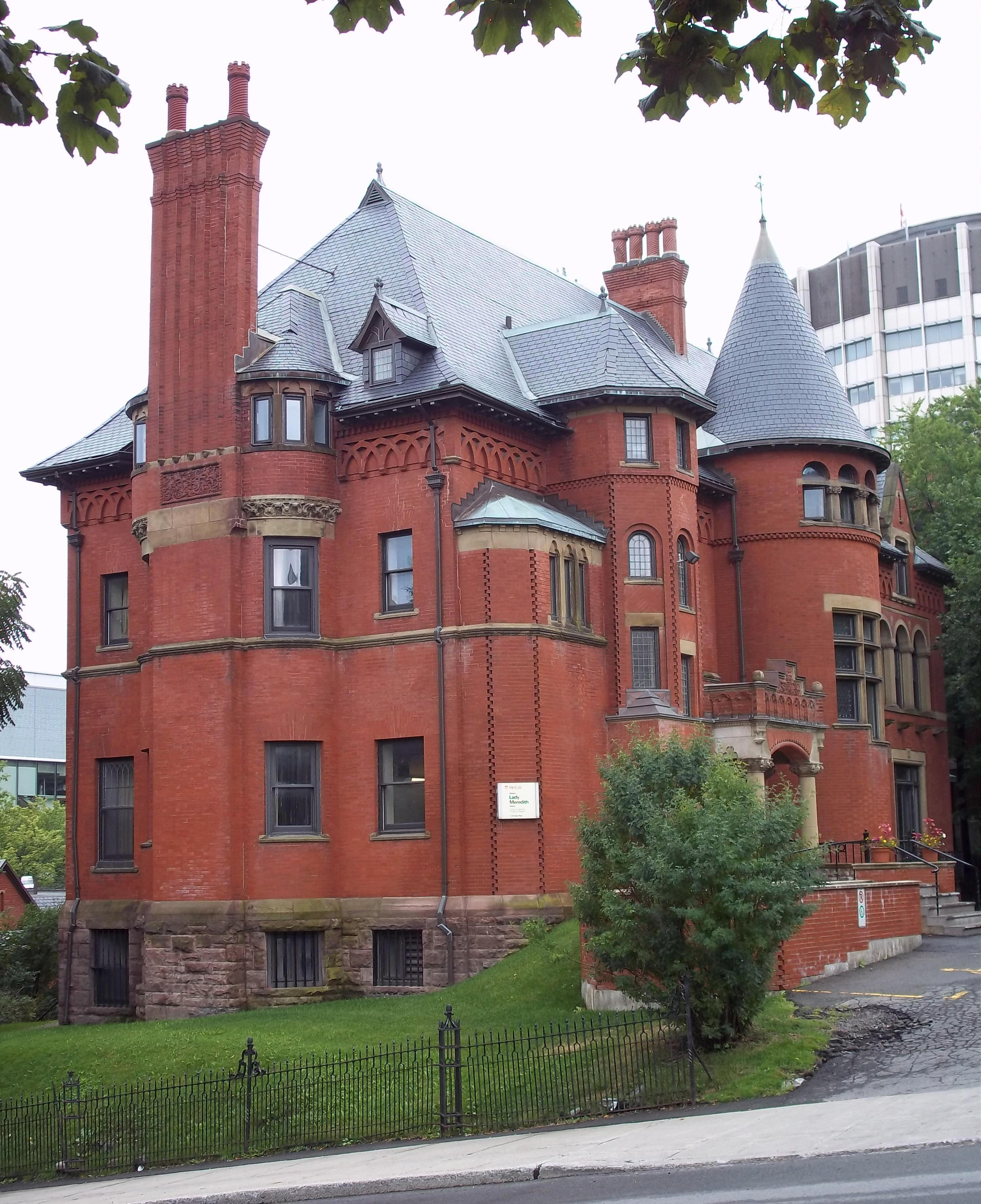 Résidence H.-Vincent-Meredith, 1110, avenue des Pins Ouest, Montréal